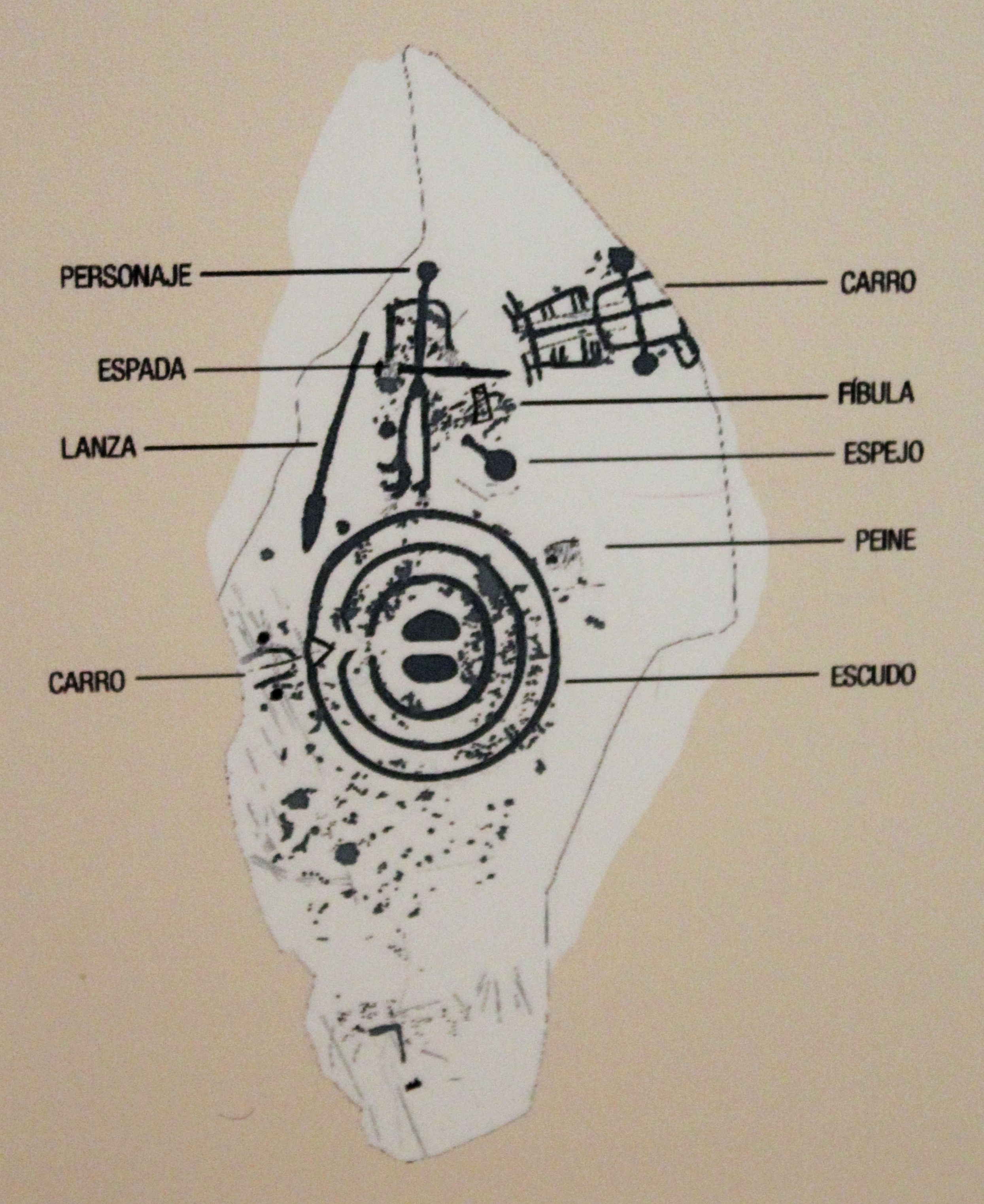 Estela de La Yuntilla Alta. Cabeza Buey. Badajoz